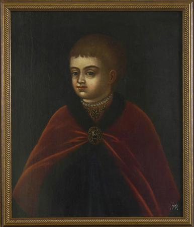 Portrait of young Peter I of Russia. Parsuna of XVII c. ПОРТРЕТ ЦЕСАРЕВИЧА ПЕТРА АЛЕКСЕЕВИЧА (?) Россия, конец XVII-начало XVIII века. Неизвестный художник. Холст, масло.